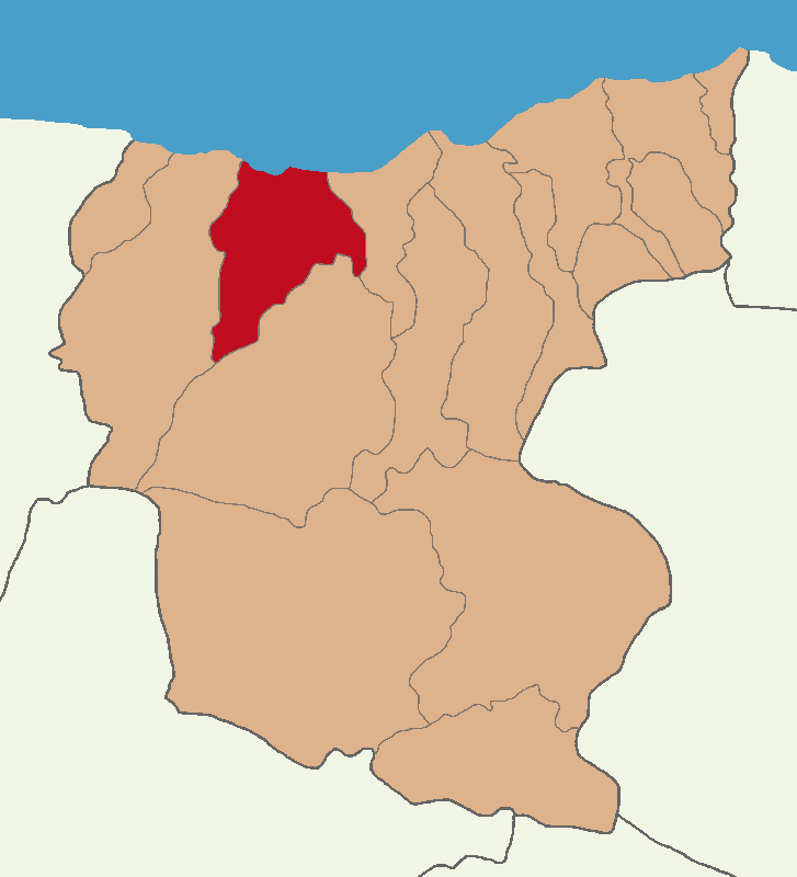 Giresun Merkez ilçesinin konumu